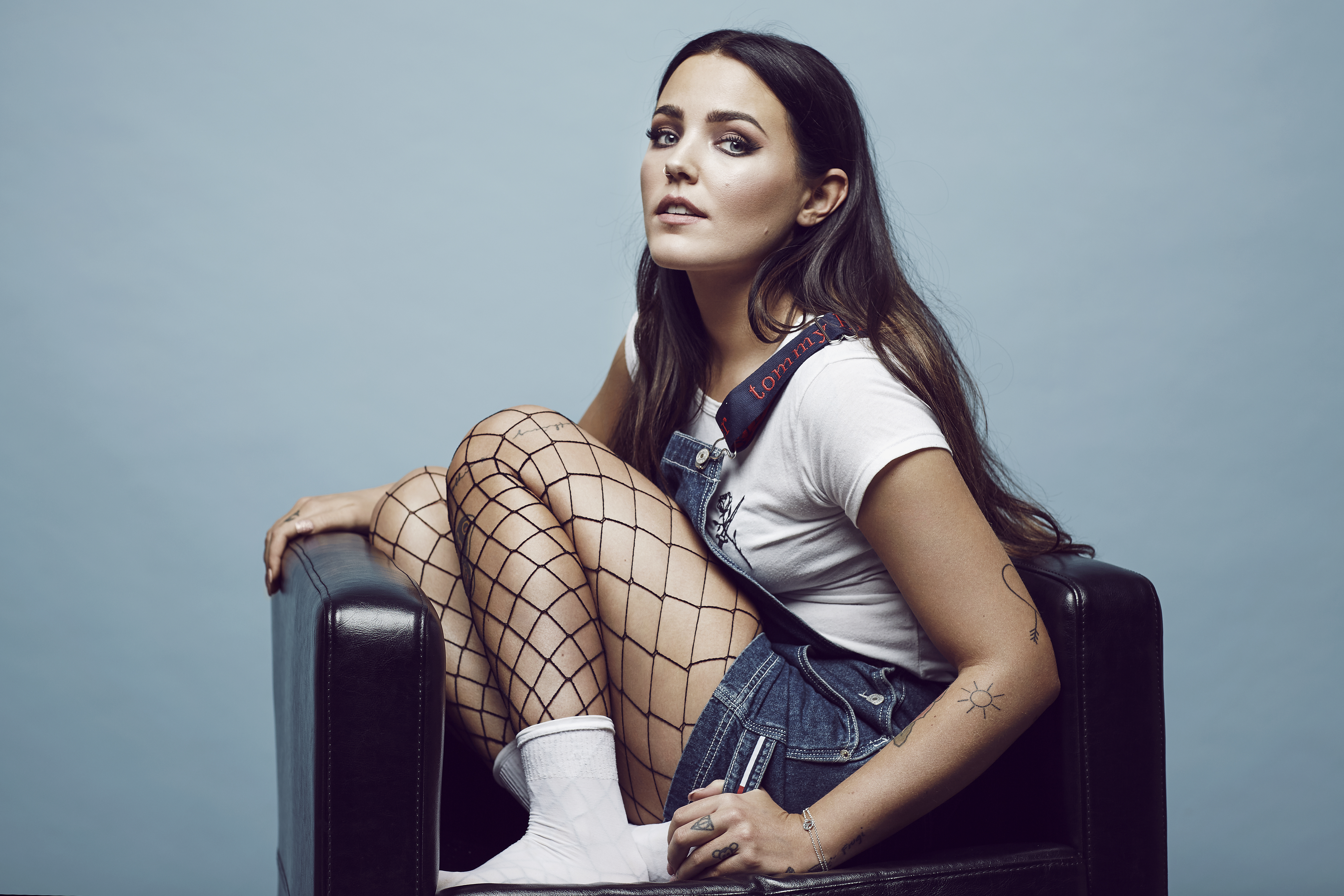 Міріам Браянт у 2017